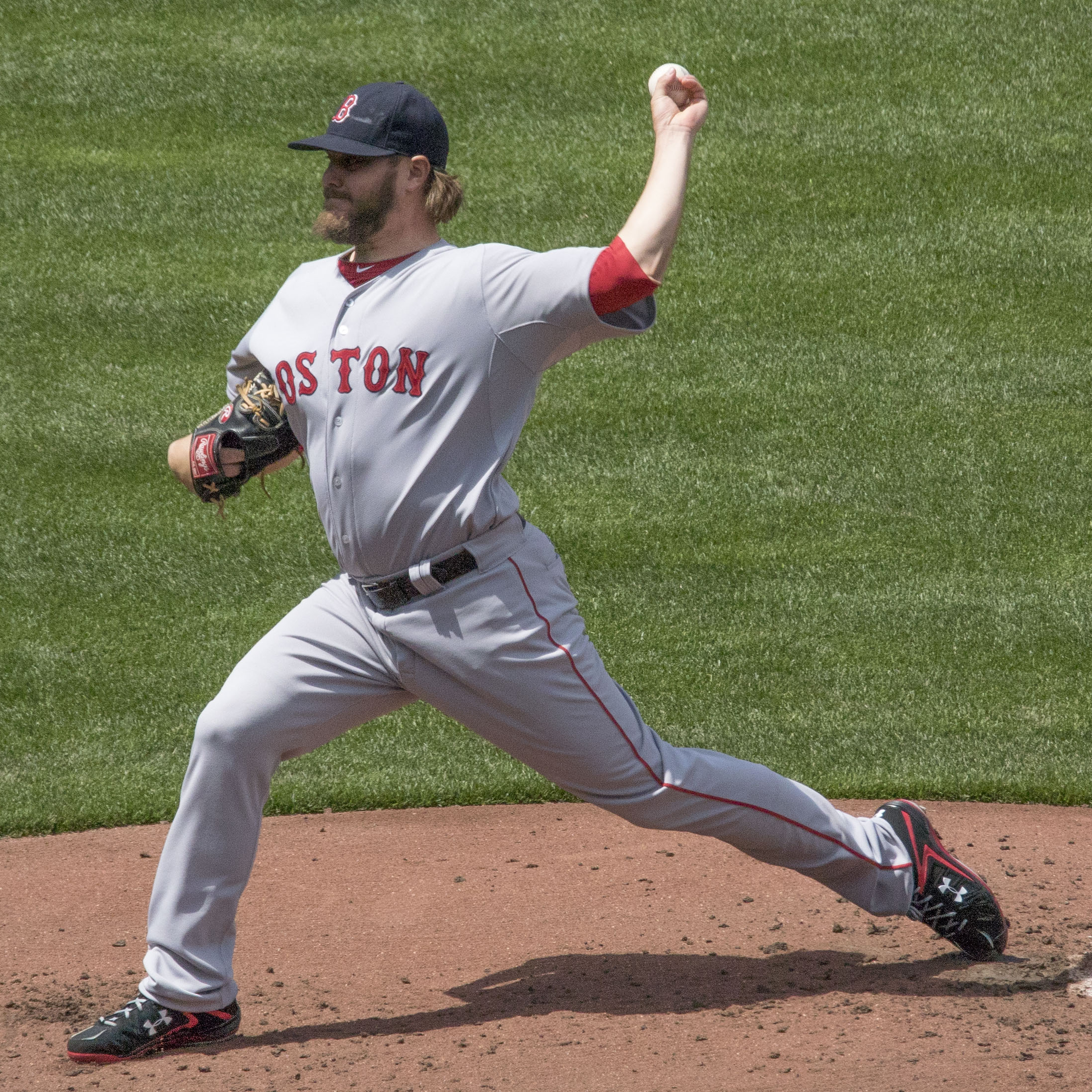 Wade Miley